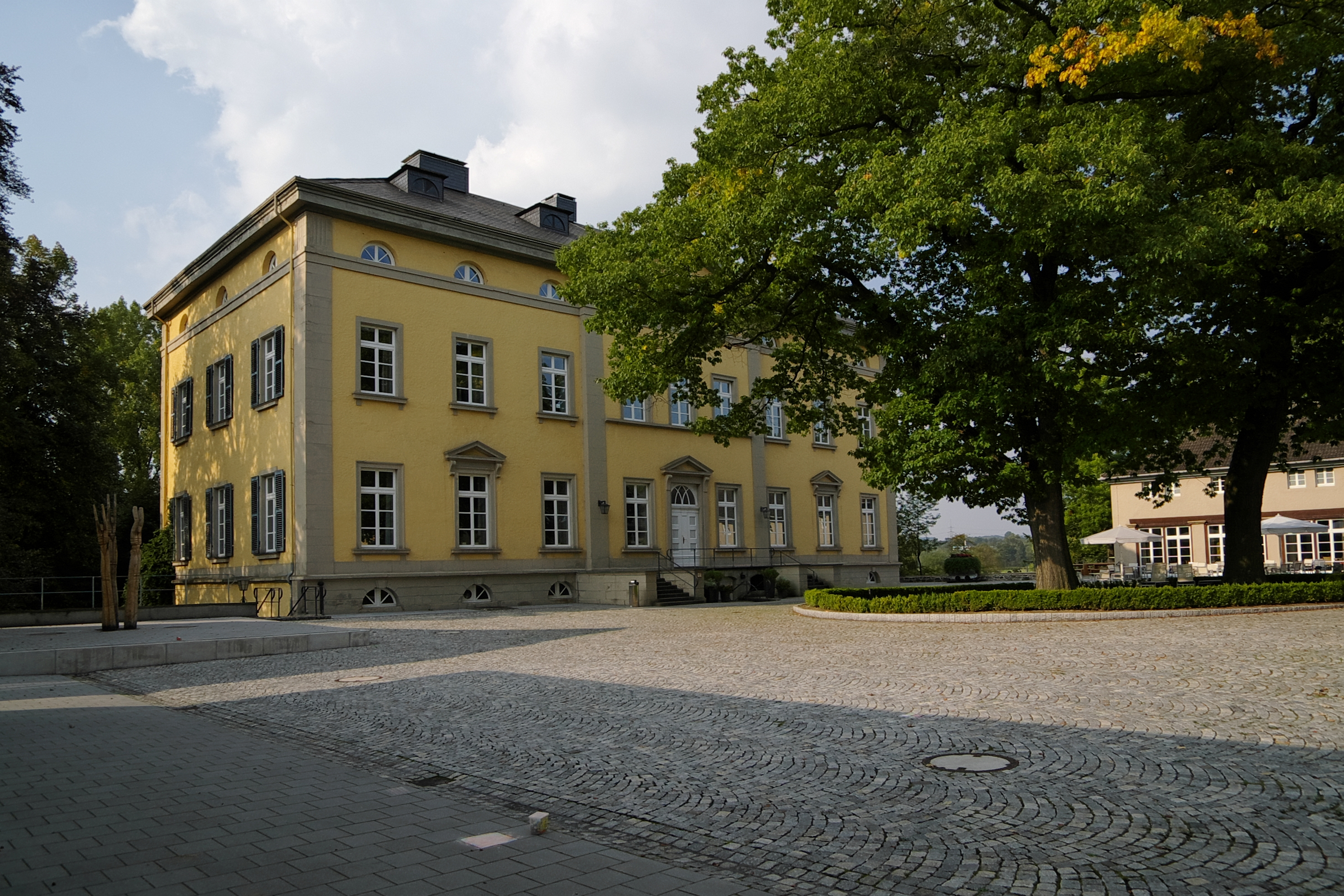 Haus Villigst, evangelische Akademie bei Schwerte-Villigst an der Ruhr.